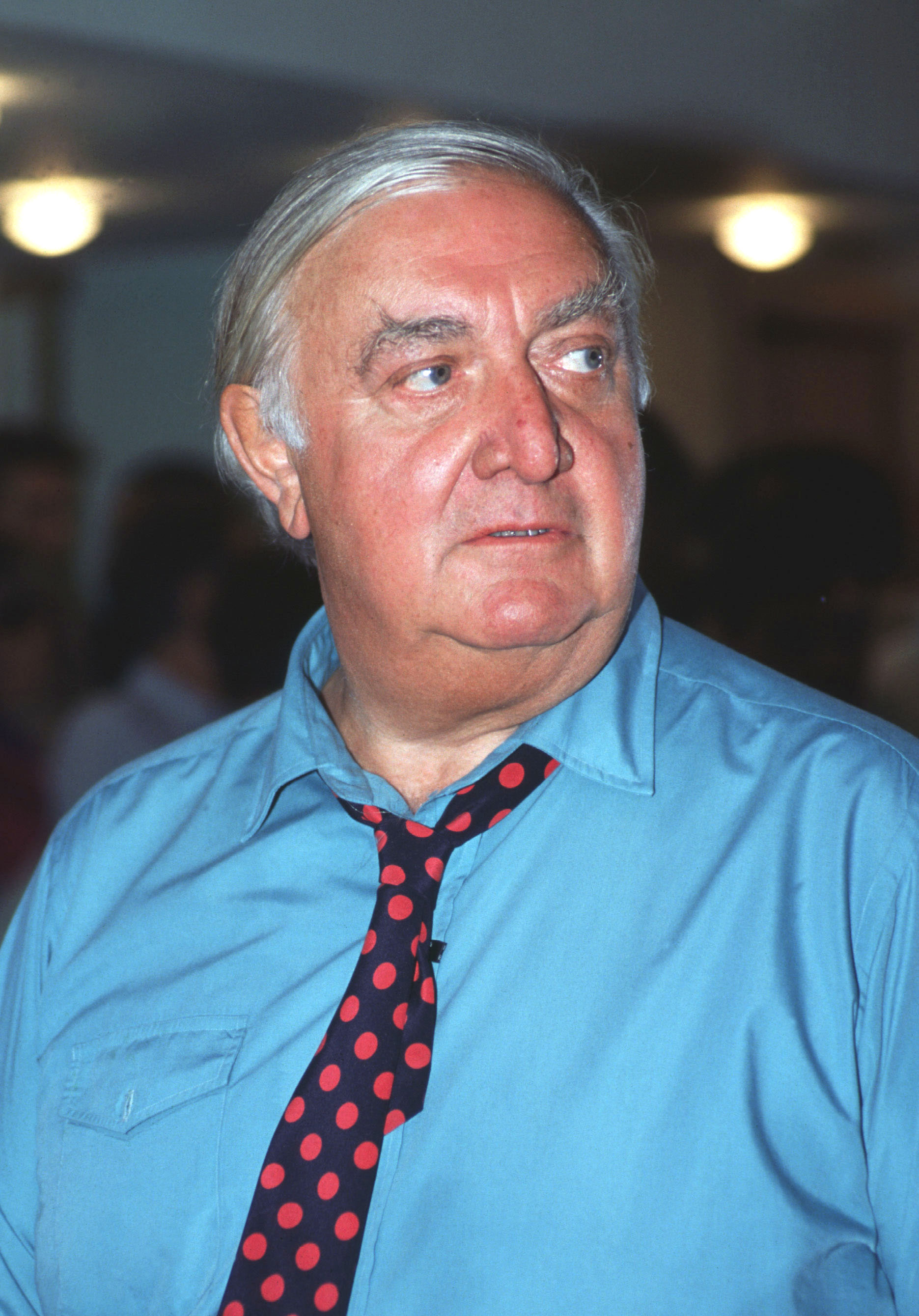 L'architetto britannico James Stirling all'inaugurazione della 'libreria' ai Giardini della Biennale di Venezia